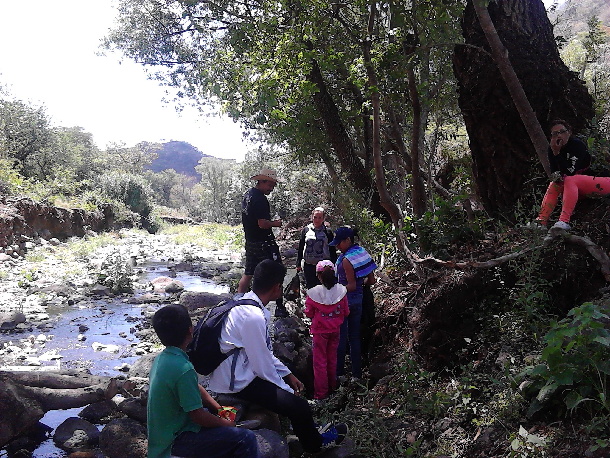 Río Huascato, punto de recreación y fuente de agua para los cultivos de Pénjamo, Gto.